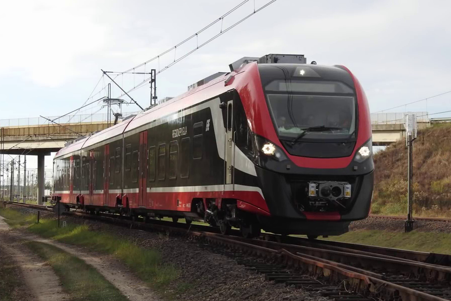 Elektryczny zespół trakcyjny Newag Impuls II dla włoskiego przewoźnika Ferrovie del Sud Est podczas testów na torze doświadczalnym Instytutu Kolejnictwa w Węglewie pod Żmigrodem.